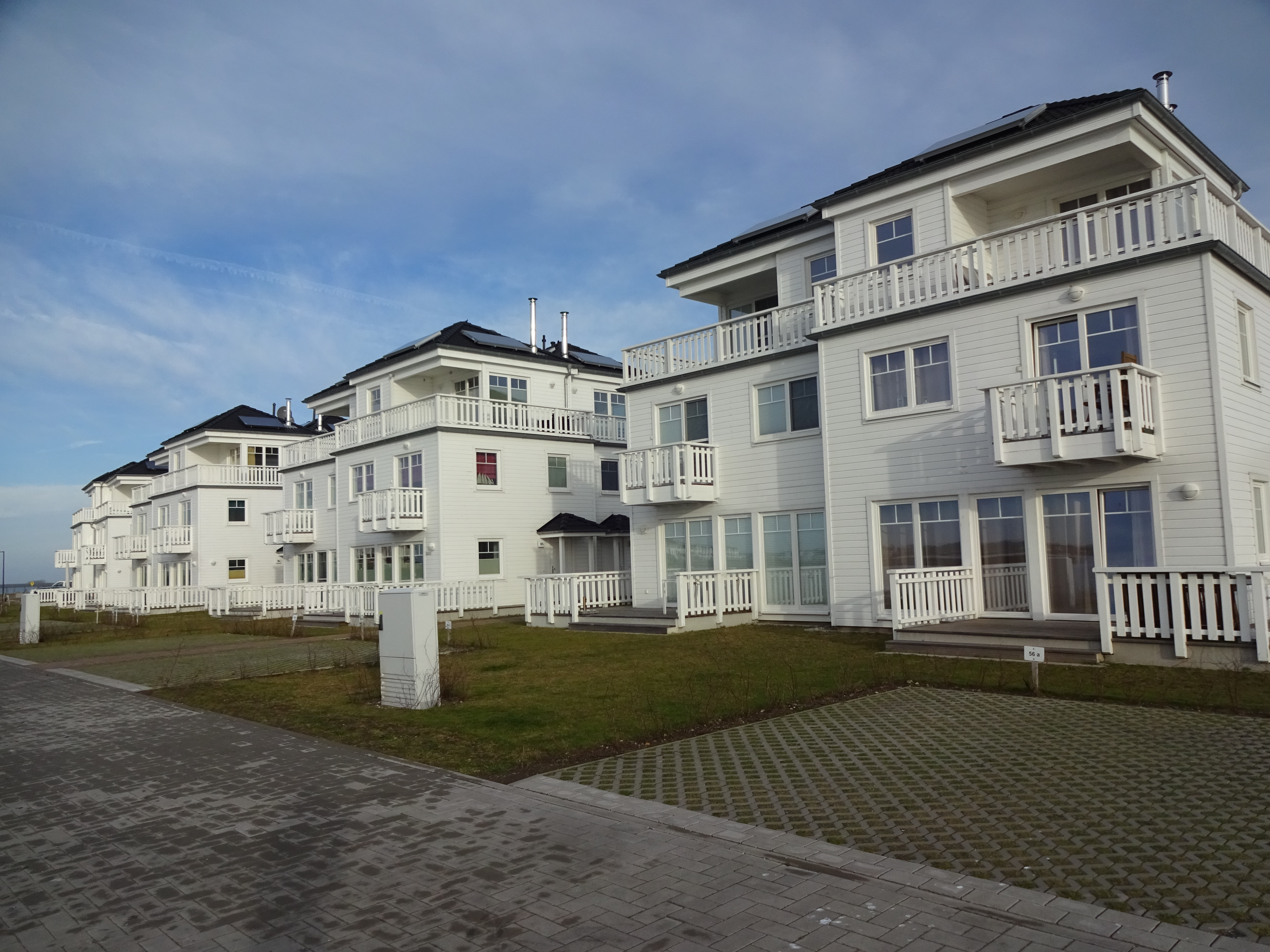 Die Weißen Strandvillen, die ersten von der HELMA Ferienimmobilien GmbH im Ostseeresort Olpenitz (damals Port Olpenitz) errichteten Gebäude.